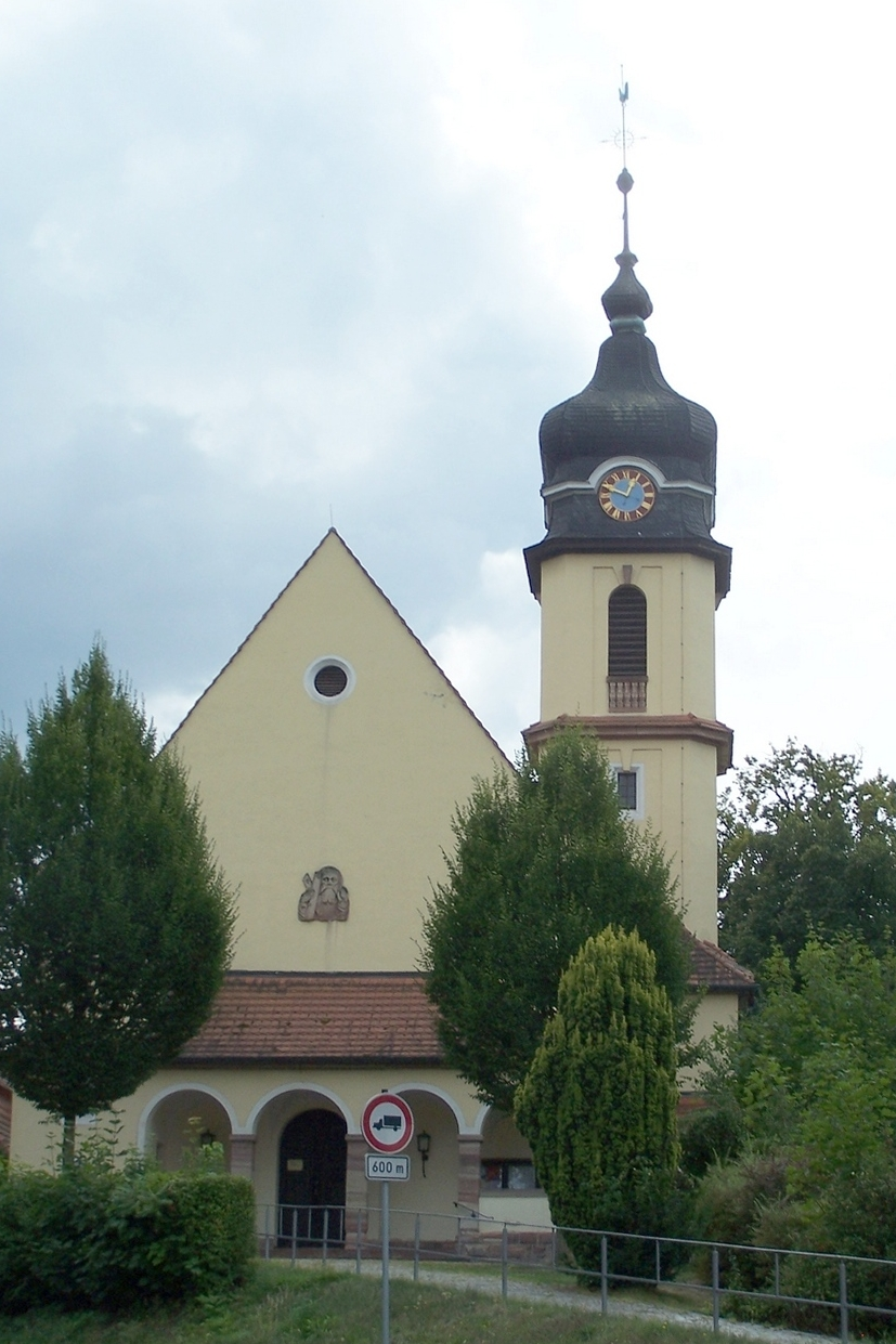 Die St.-Andreas-Kirche in der Andreasstraße in Bad Salzungen.